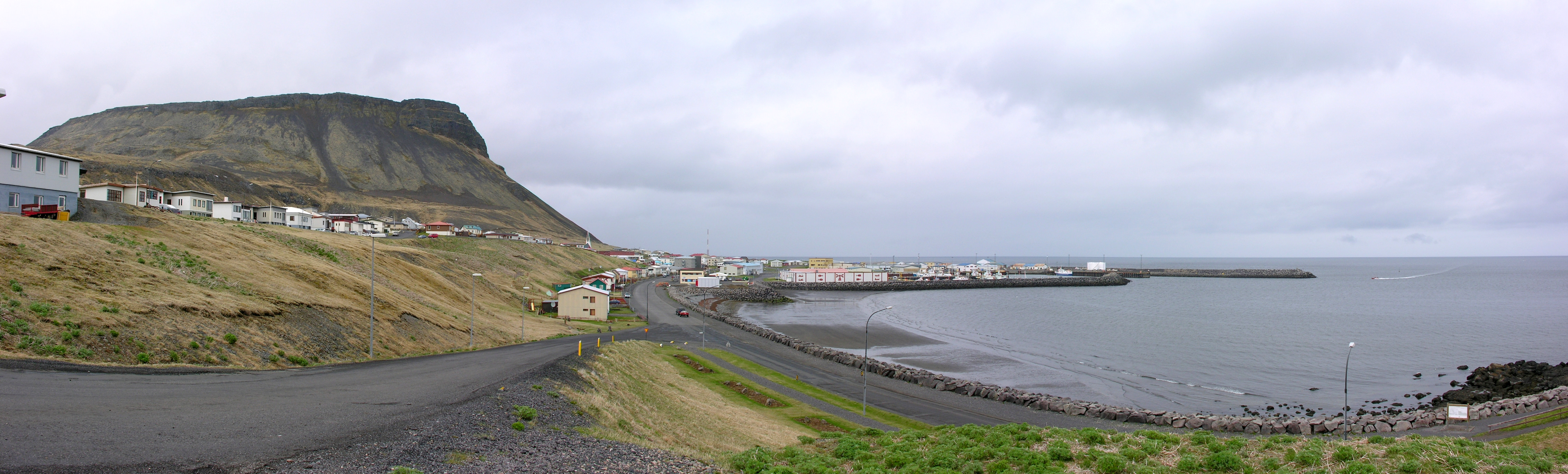 Iceland, Ólafsvik